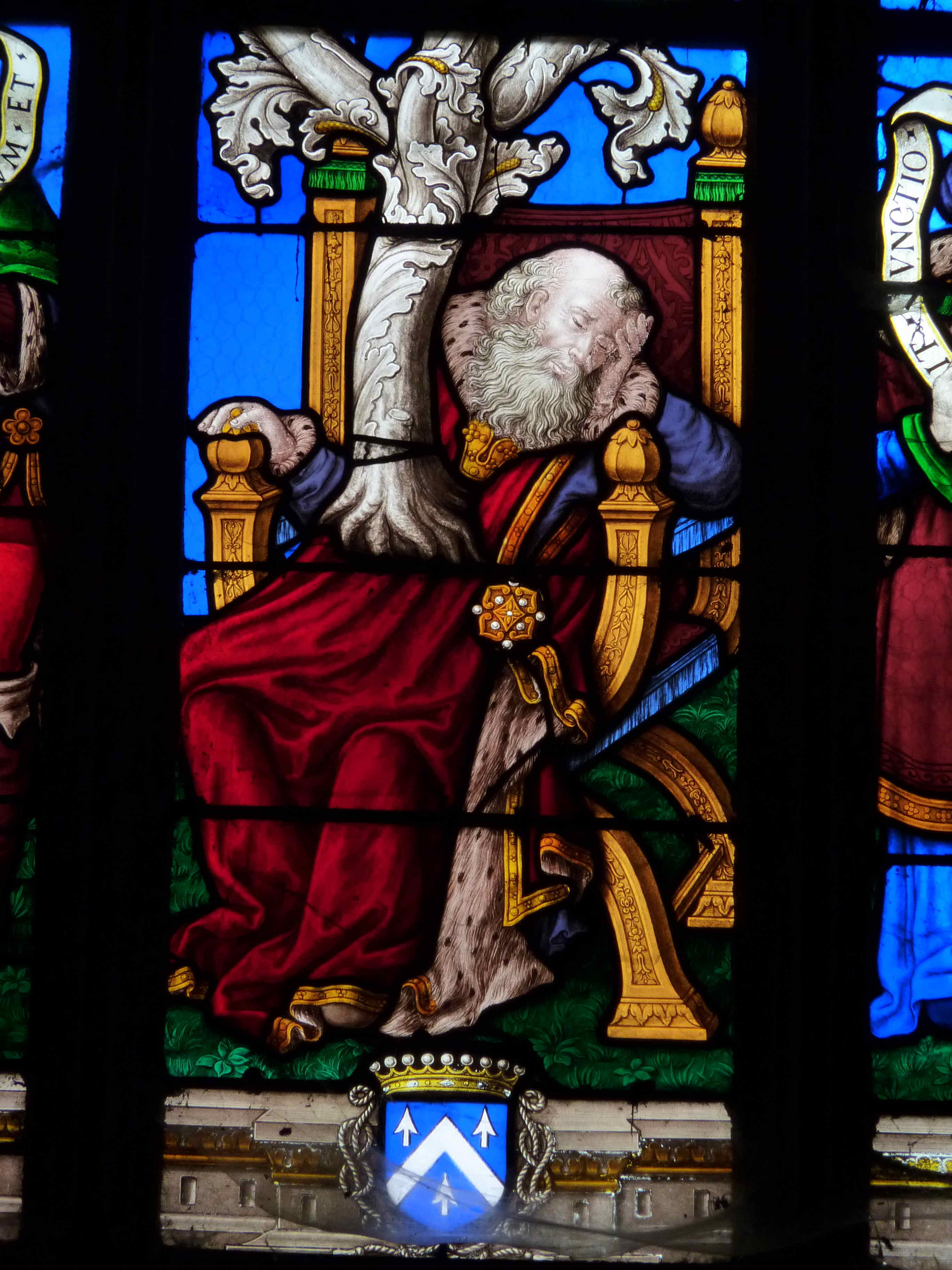 Katholische Kirche Saint-Pierre in Dreux im Département Eure-et-Loir (Centre-Val de Loire/Frankreich), Bleiglasfenster von 1877 von Eugène Moulin in der Kapelle Sacré-Coeur; Darstellung: Wurzel Jesse; Ausschnitt: Jesse